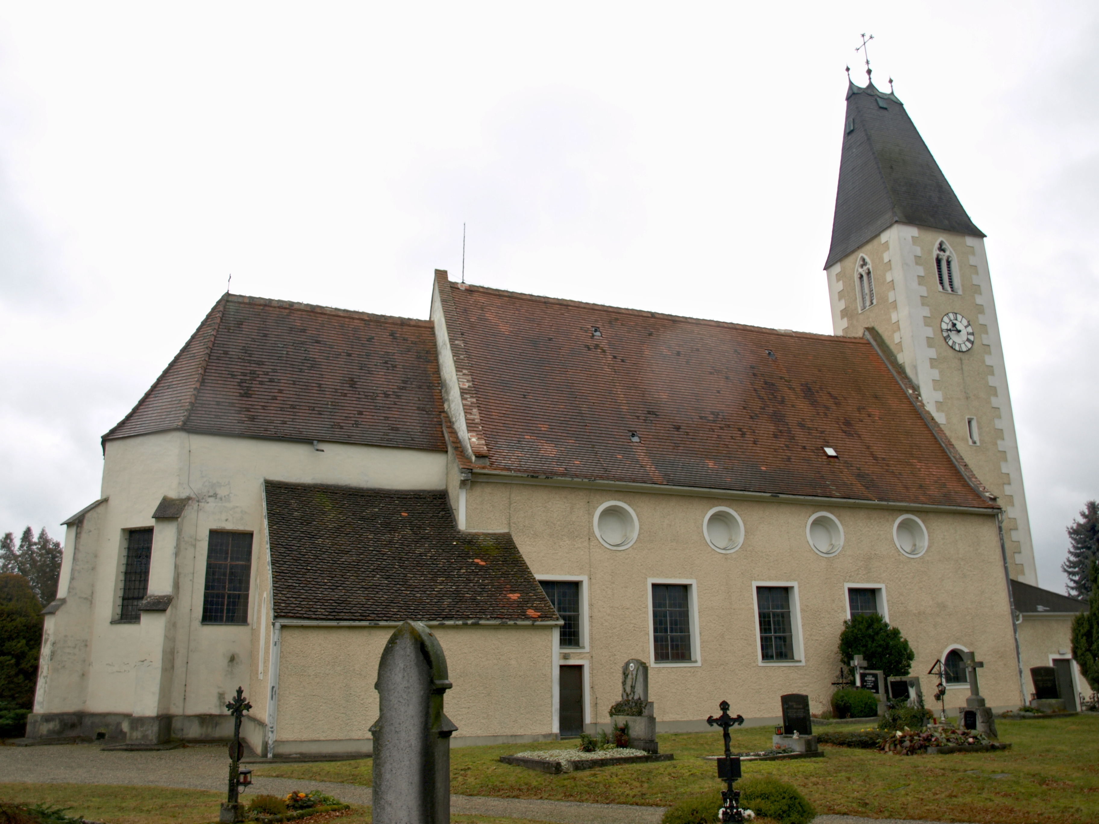 Kath. Pfarrkirche hl. Zeno und Friedhof